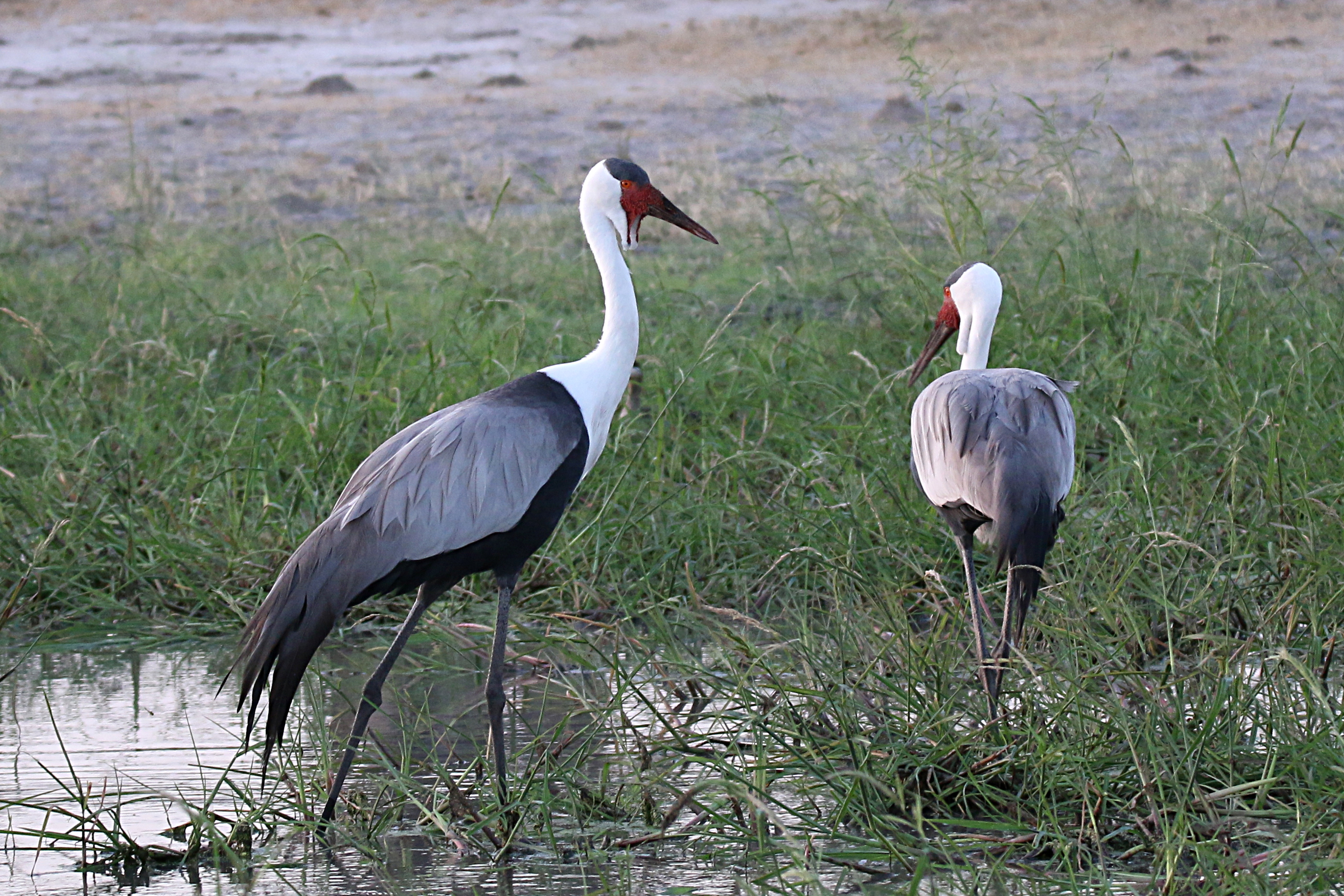 Wattled Crane Grus carunculata, Linyanti, Caprivi, Namibia.